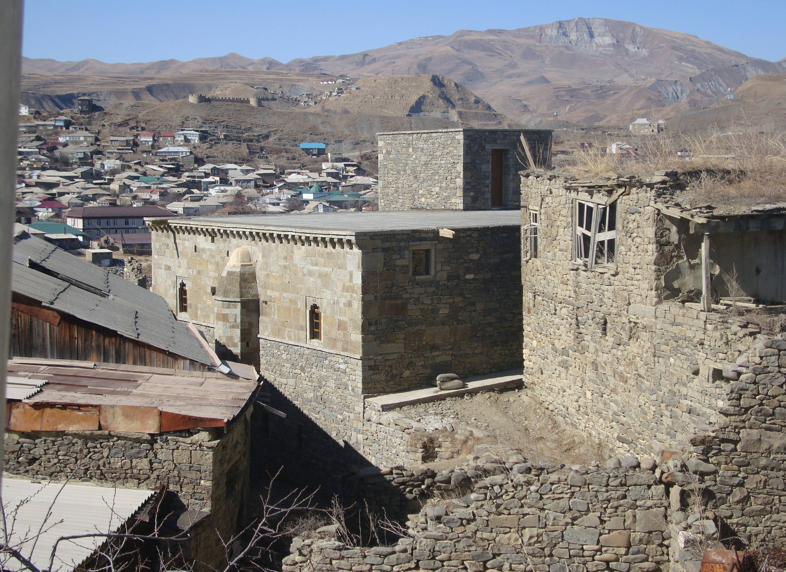 Лакский район, с. Хури